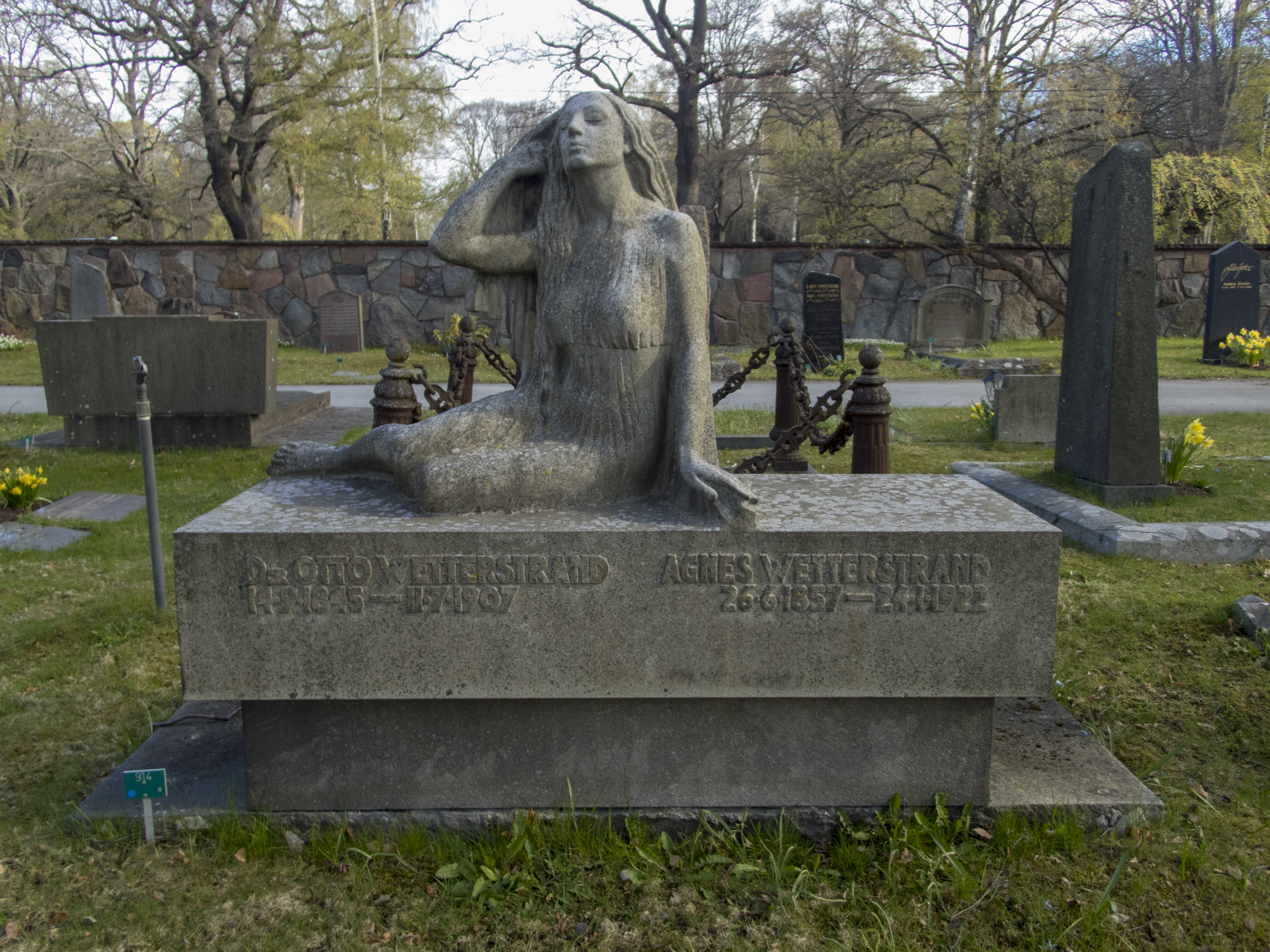 Gravvård Solna, Otto Georg Wetterstrand, Solna kyrkogård.